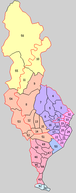 静岡県志太郡、榛原郡の町村。